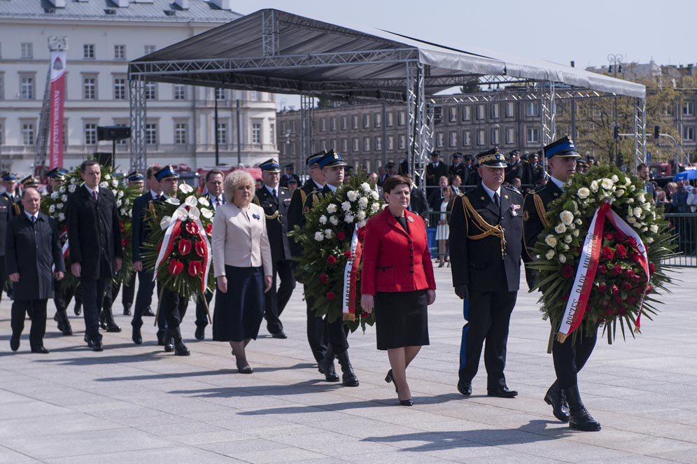 Plac Piłsudskiego w Warszawie, centralne obchody Dnia Strażaka.